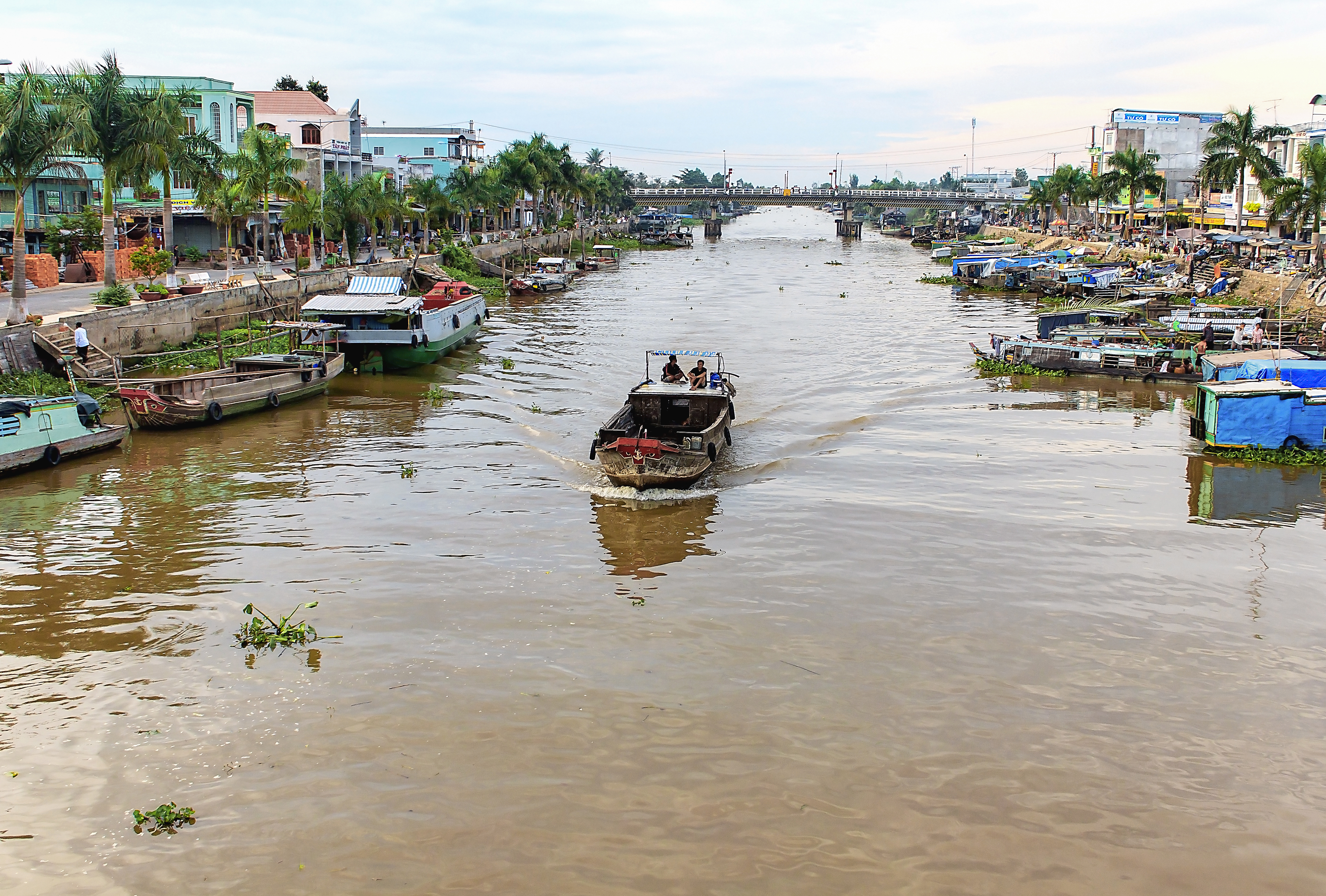 Phố chợ Tháp Mười bên một dòng kênh cùng tên ở thị trấn Mỹ An, huyện Tháp Mười, Đồng Tháp, Việt Nam.